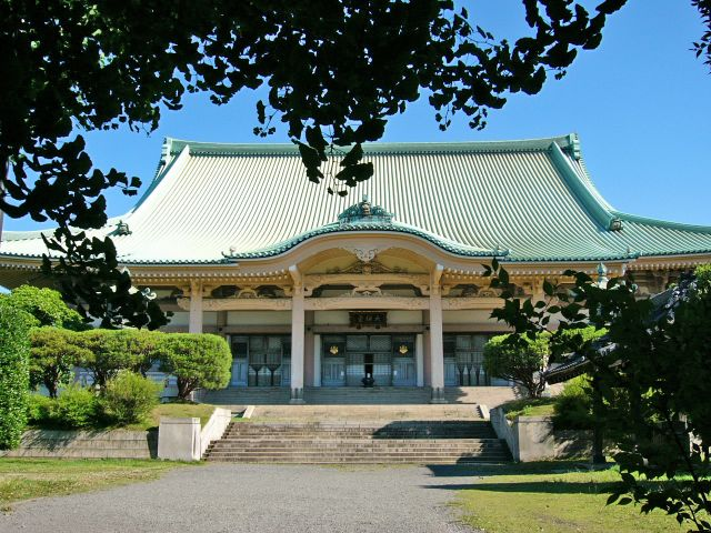 総持寺、大祖堂（だいそどう）